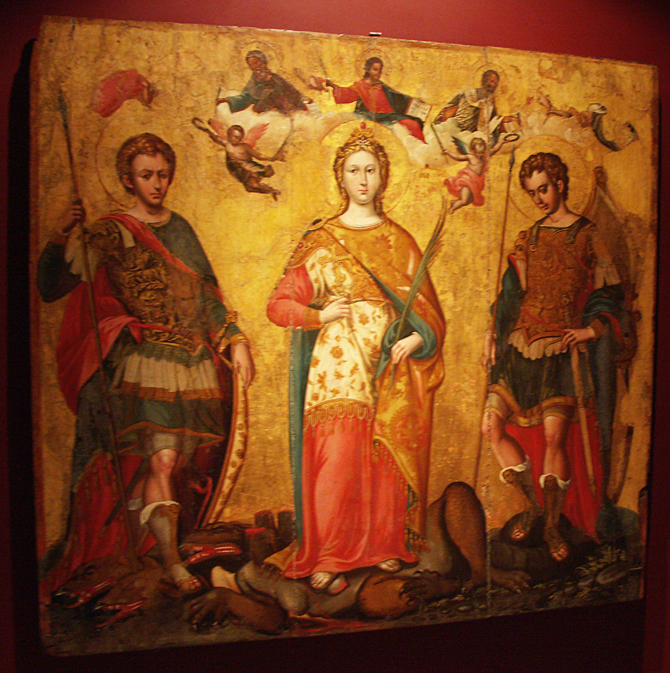 Tempera à l'oeuf sur bois représentants des saints fêtés le 7 octobre, jour commémoratif de la victoire navale de Lépante (Naupacte) sur les Ottomans.